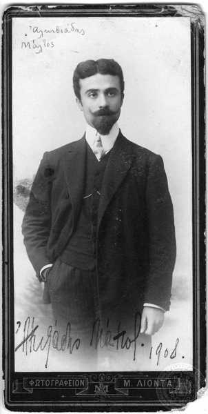 Алкивиадис Малтос